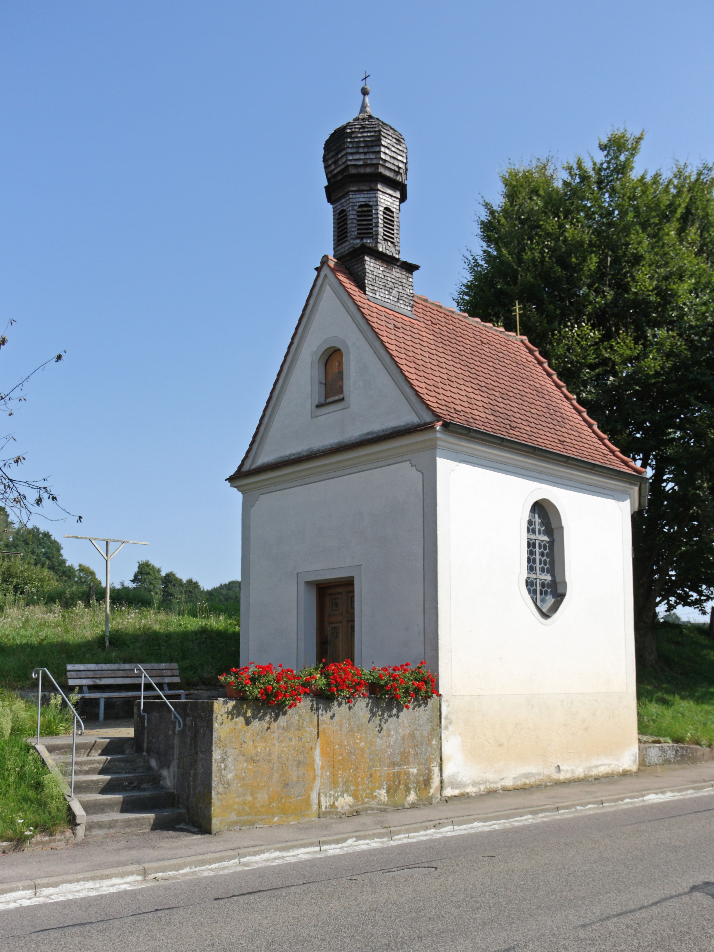 Kapelle St. Otmar in Kleinbeuren, Gemeinde Kammeltal; 1777 von Joseph Dossenberger d.J. errichtet